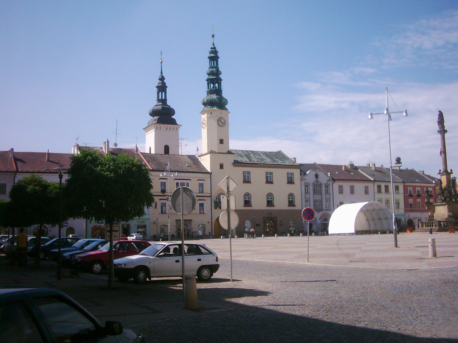 Pohled na náměstí TGM a radnici v Moravské Třebové. Vpravo Morový sloup.